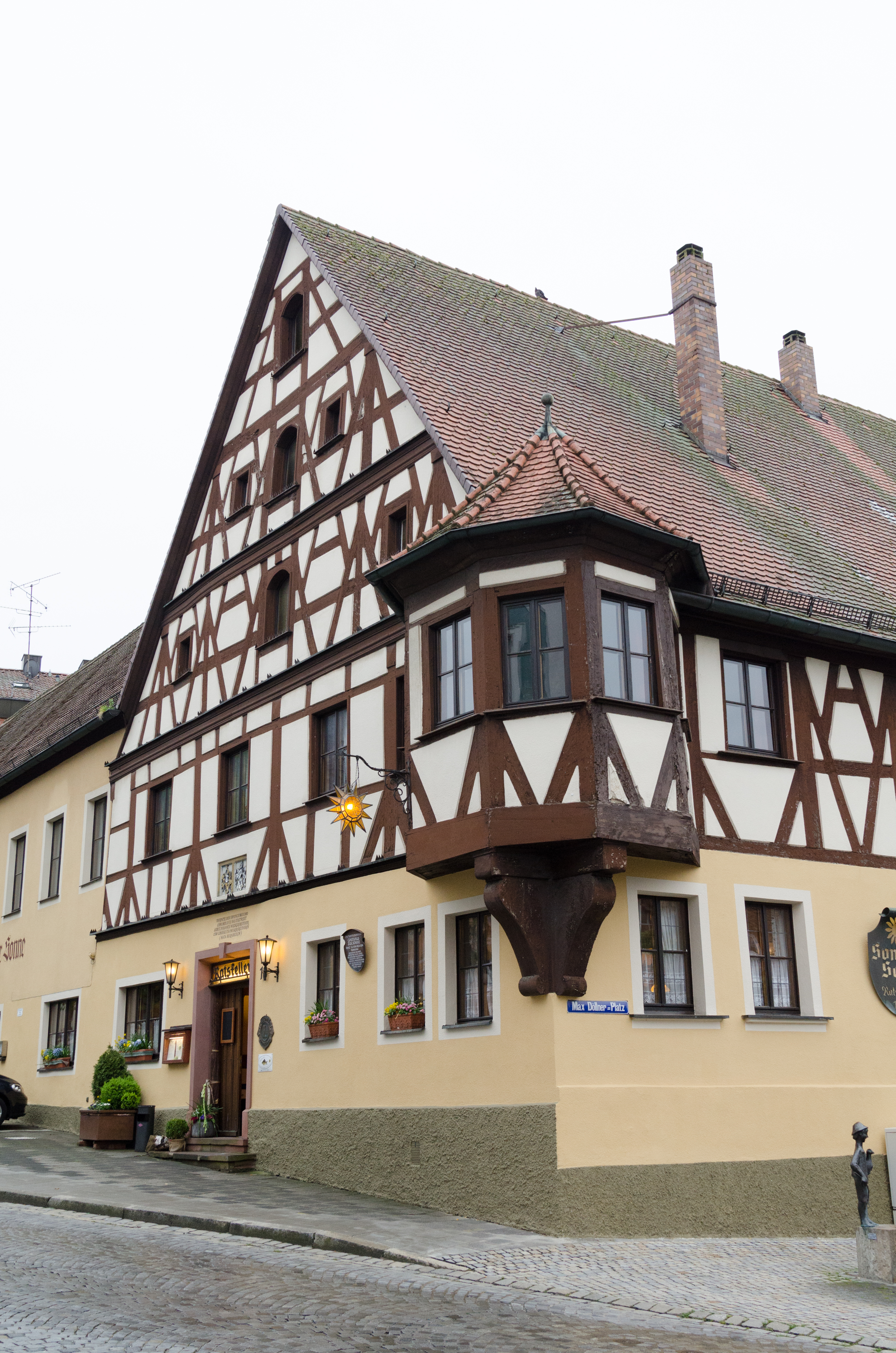 Neustadt an der Aisch, Nürnberger Straße 18, Gasthaus Zur Sonne